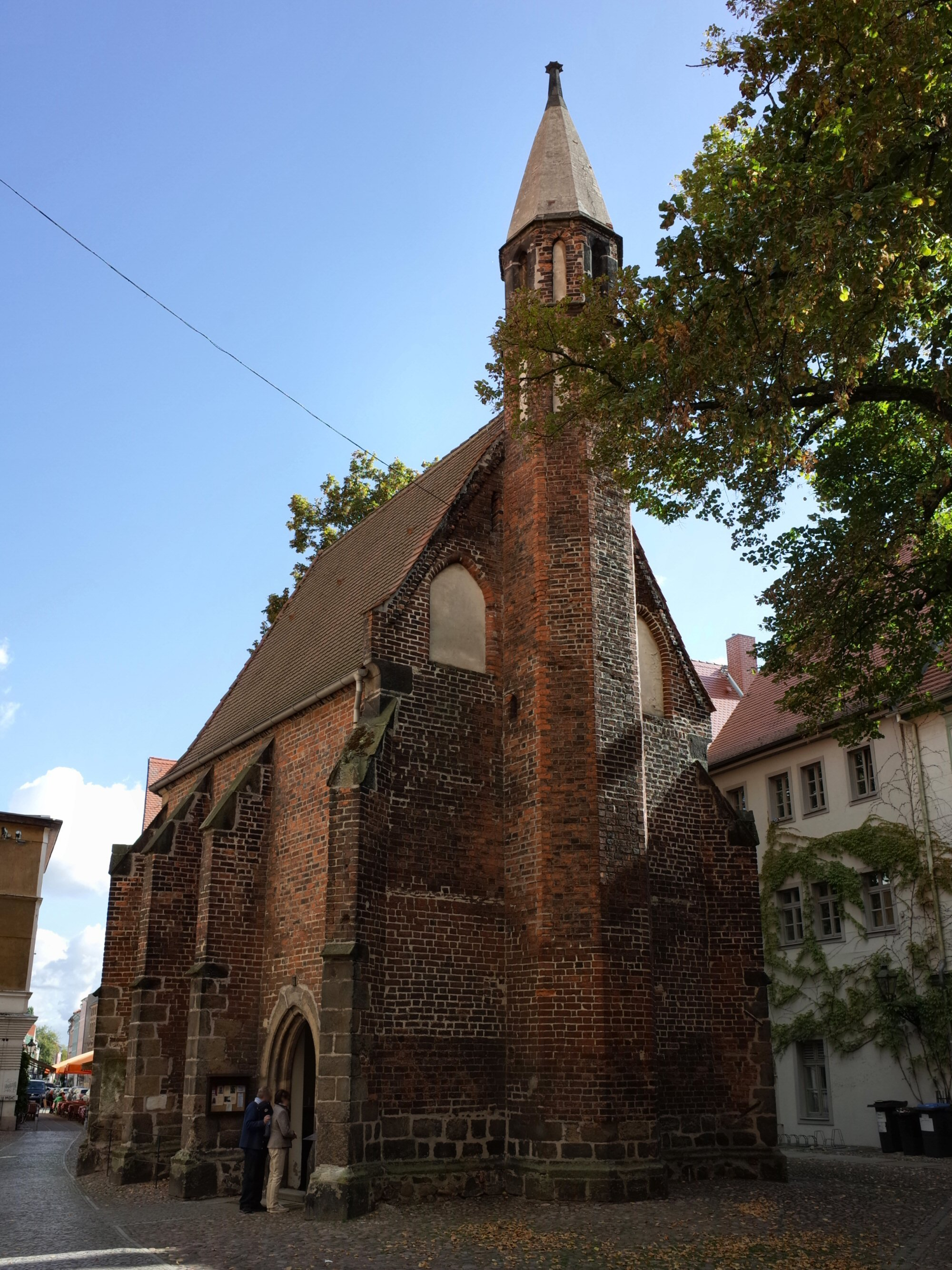 Kirchplatz, Lutherstadt Wittenberg, Fronleichnamskapelle (Kulturdenkmal im Denkmalverzeichniss Sachsen-Anhalt, Erfassungsnummer: 094 35937 000 000 000 000 [1])